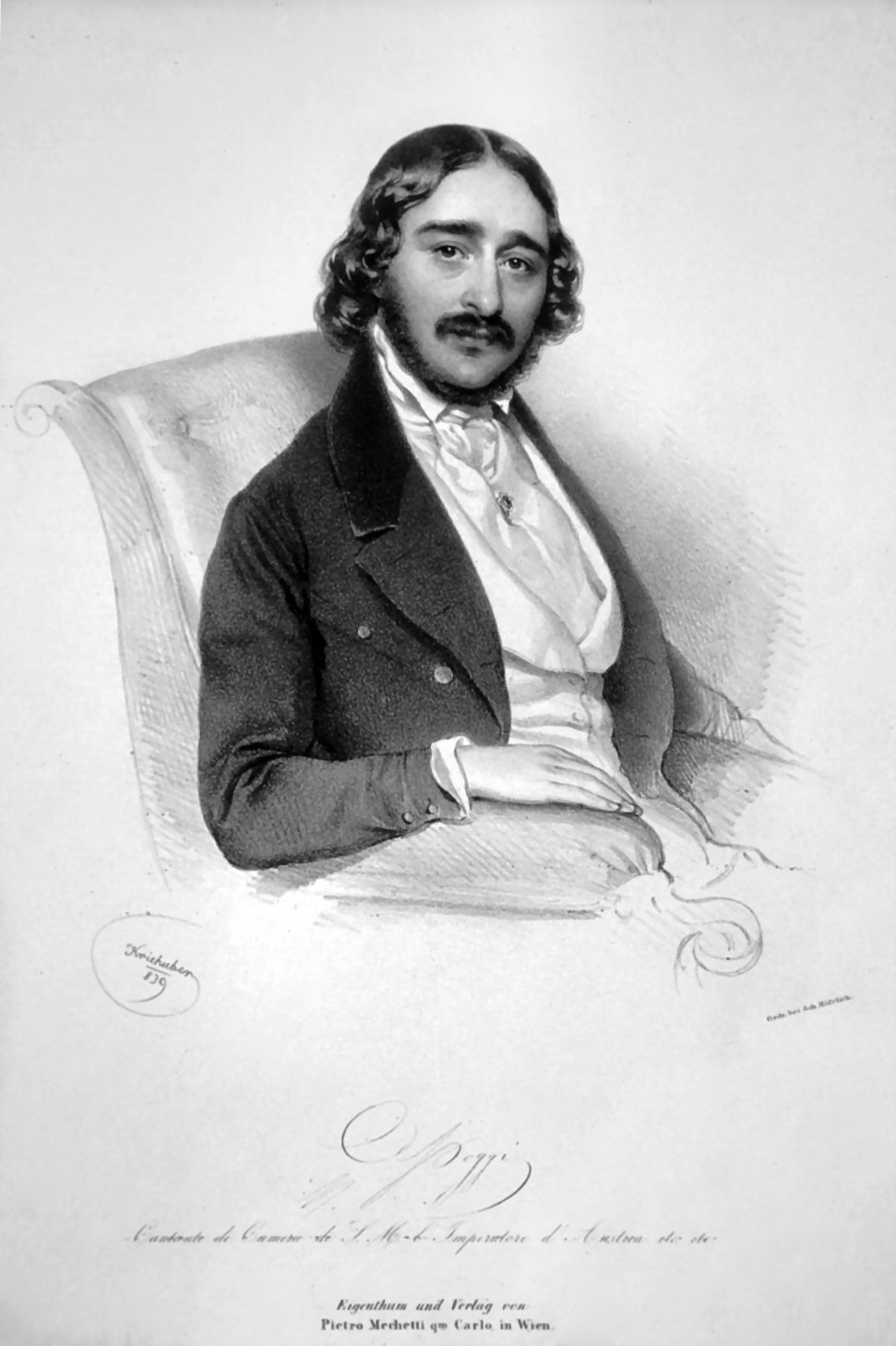 Lithographie von Josef KriehuberAntonio Poggi (1806-1875), italienischer Opernsänger (Tenor)